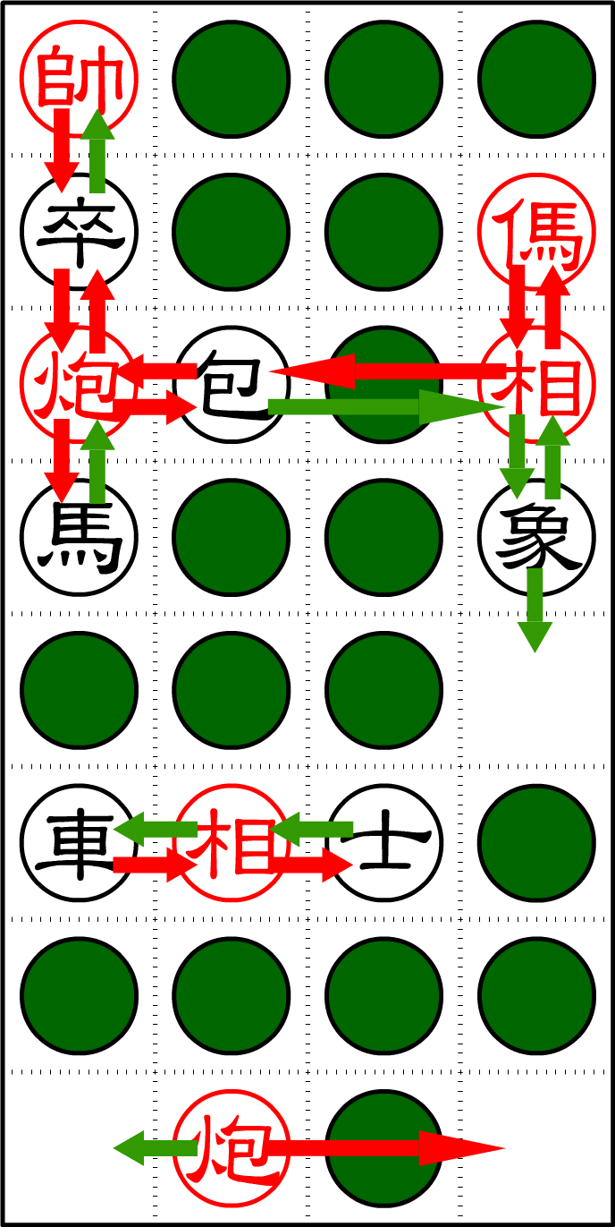 這是個有關暗棋的圖片